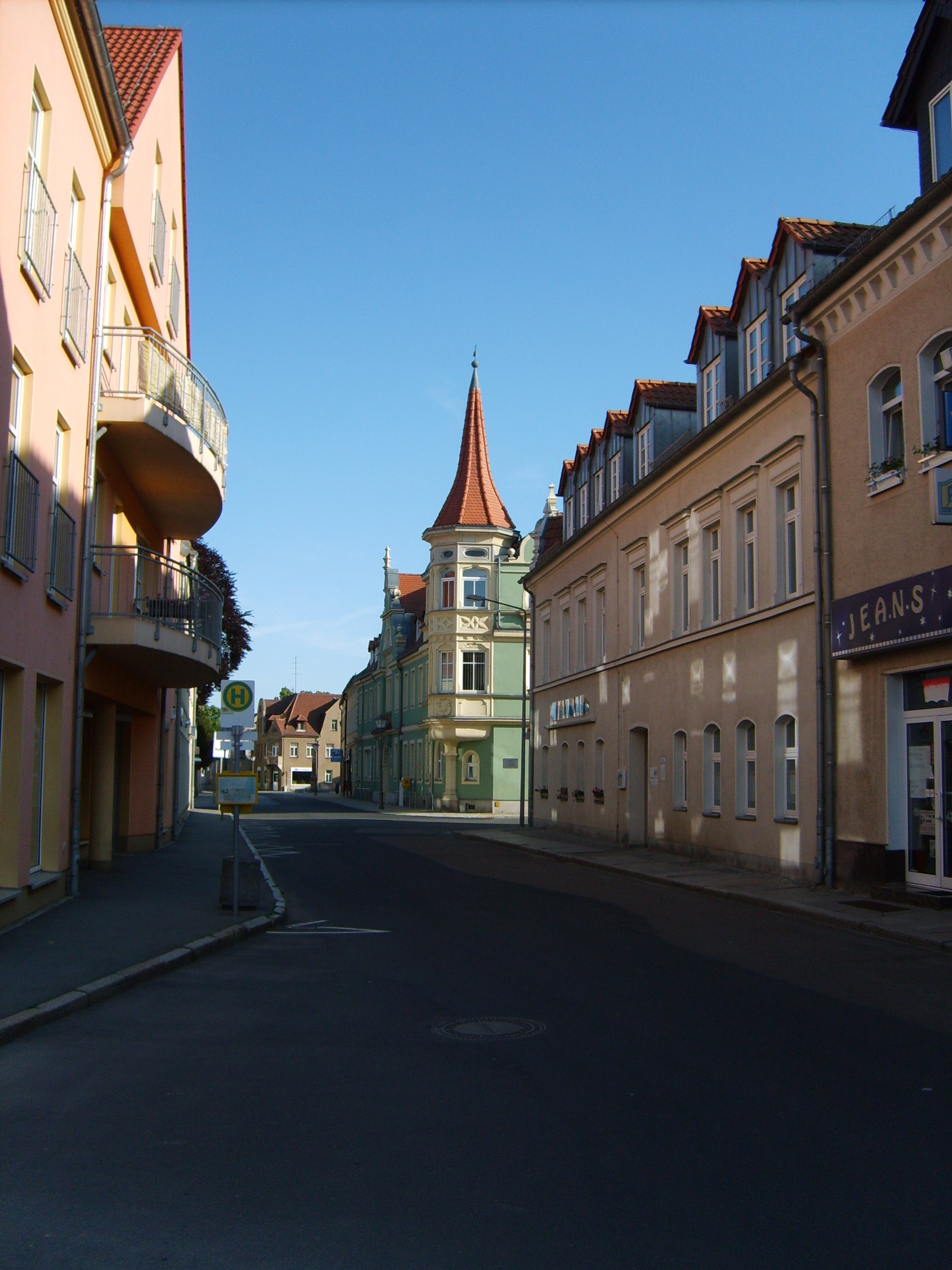 Die Hauptstrasse in Elsterwerda Richtung Süden-Auf der linken Seite befindet sich der neue Rautenkranz, auf der rechten Seite das Stadthaus und dahinter das Rathaus.